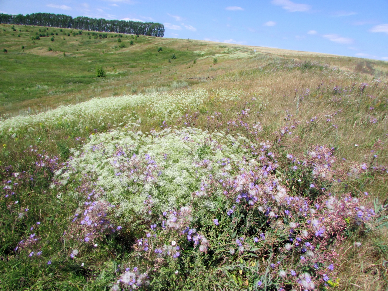 Батыревский сурковый, Батыревский район This image is related to the protected area of Russia number 2110024